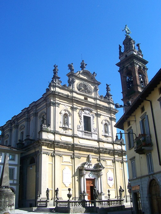 Stezzano - Chiesa Parrochiale di S. Giovanni Battista